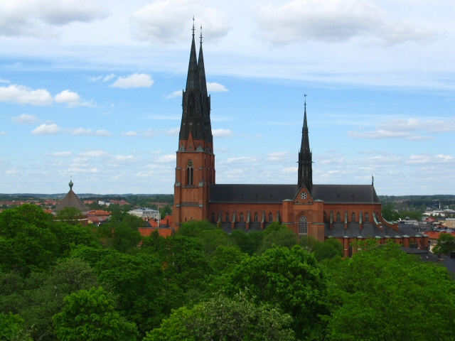 Kathedraal van Uppsala (Zweden)